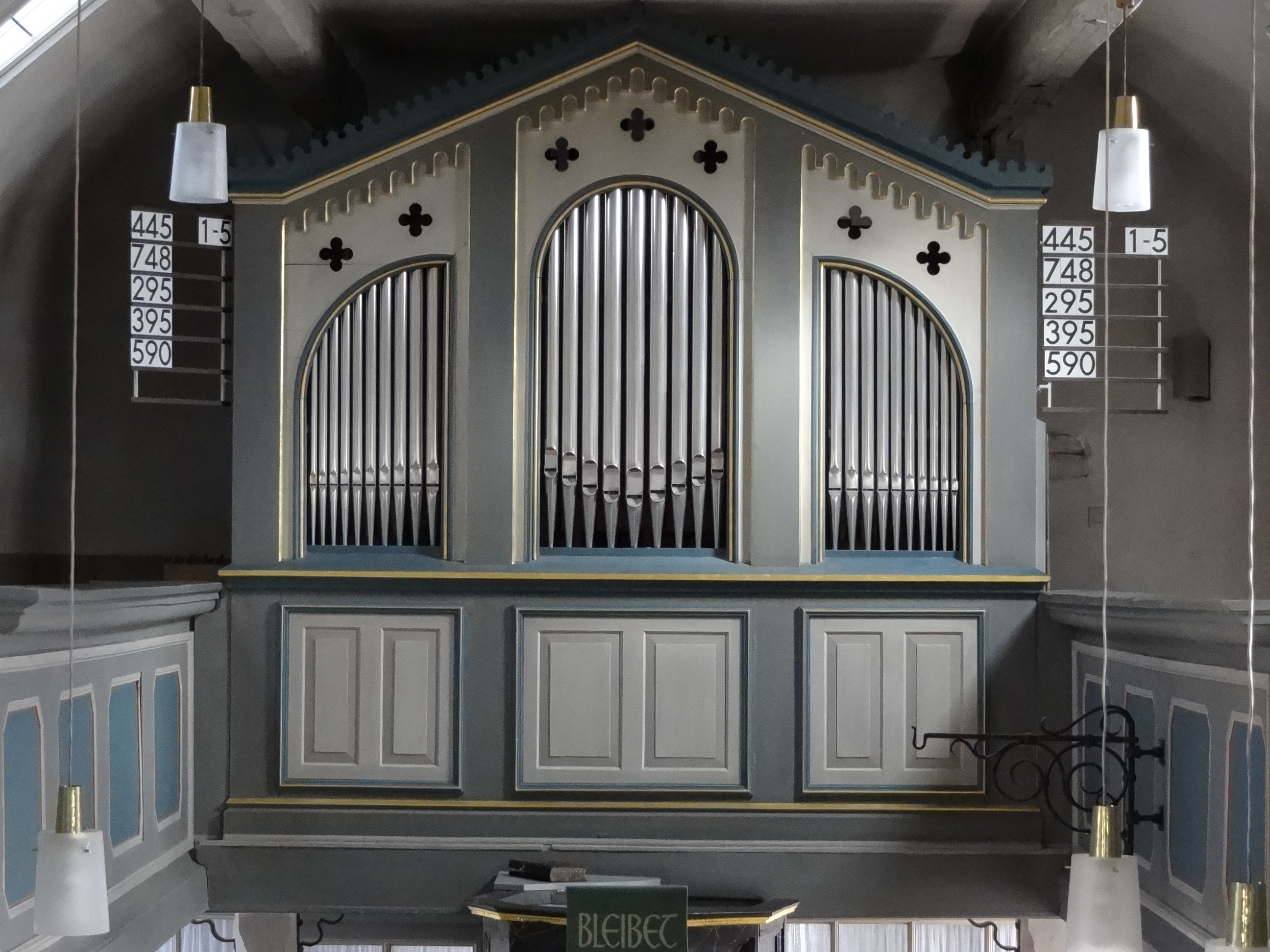 Orgel der evangelischen Kirche Allendorf/Lahn